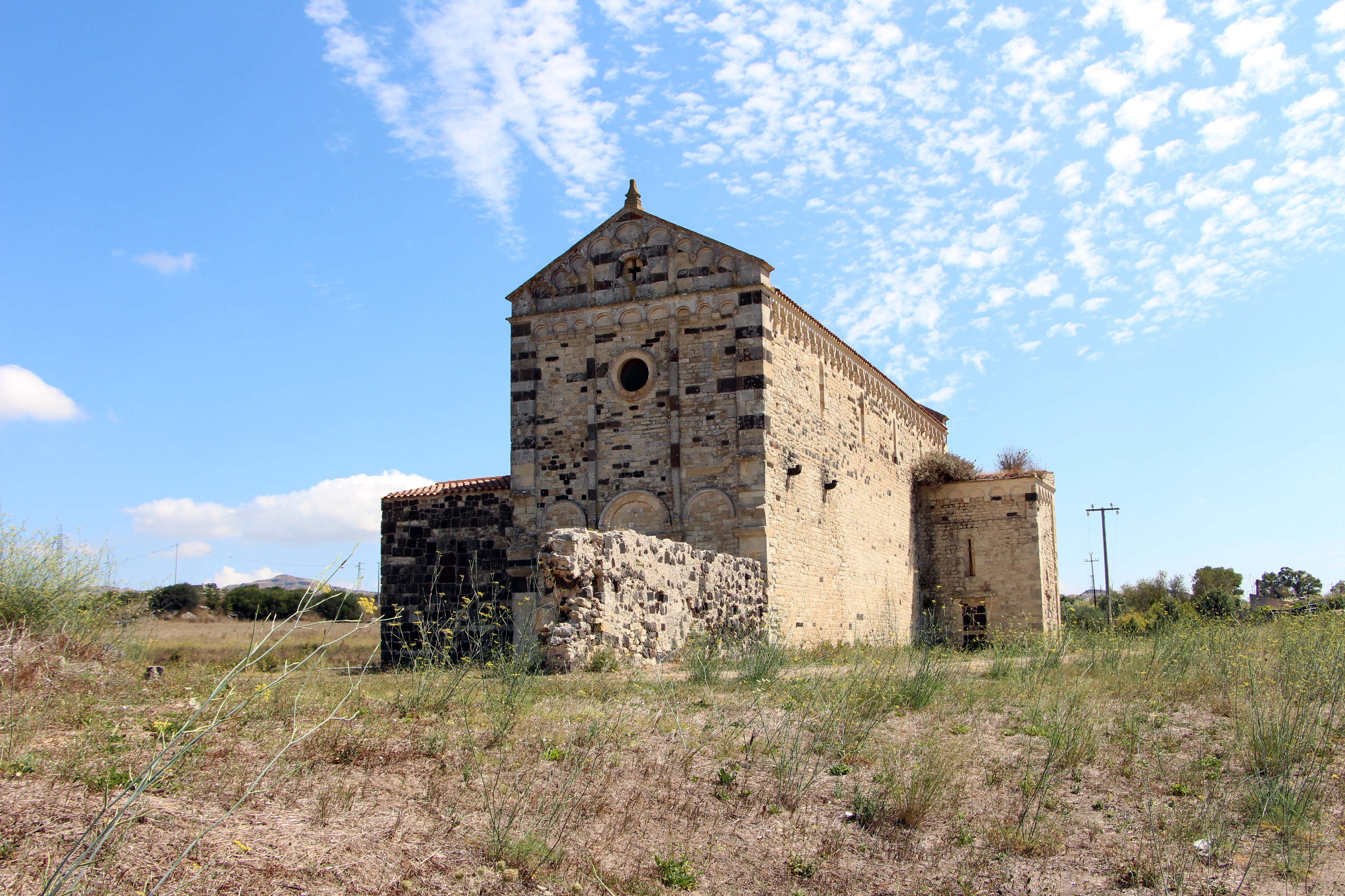 Ploaghe, SS